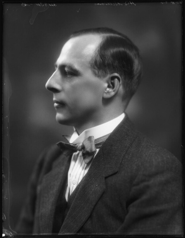 Herbert Williams